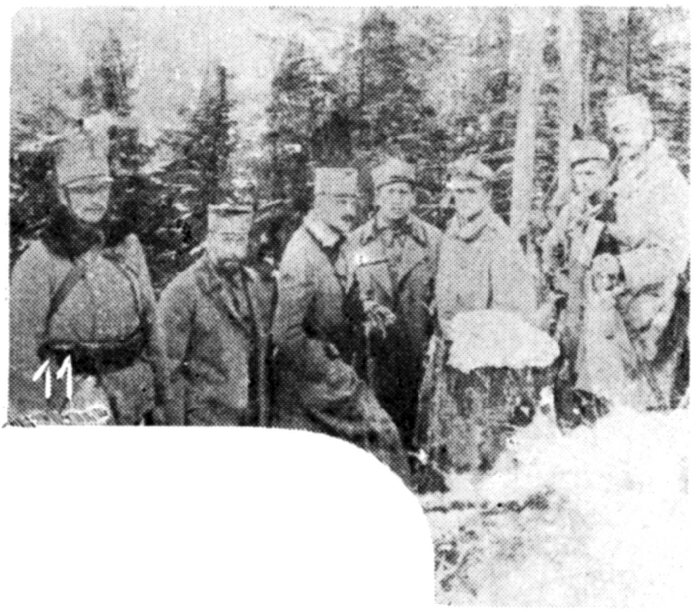 Șeful statului-major al trupelor polone din Carpați, Zagoruski (sic!), într'un grup de ofițeri